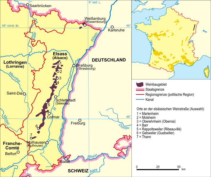 Karte Weinbaugebiet Elsass